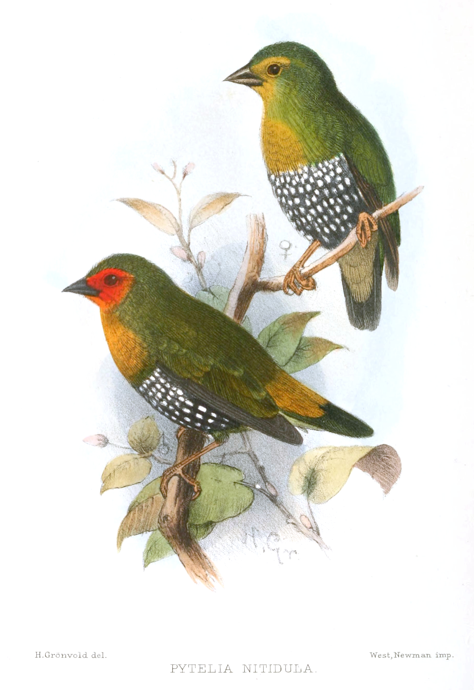 Pytelia nitidula = Mandingoa nitidula